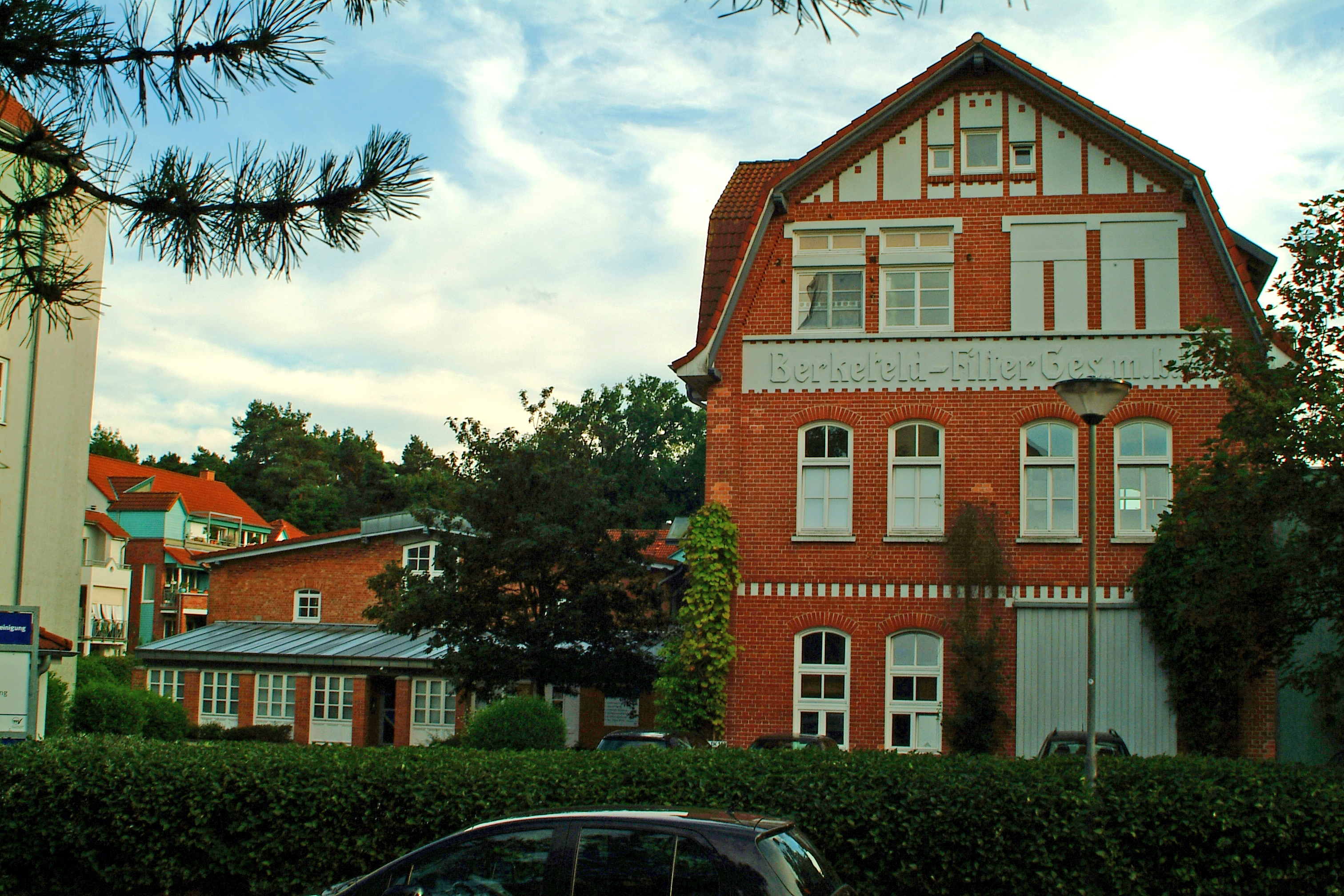 Wittinger Straße, Wohnpark Berkefeld, Celle